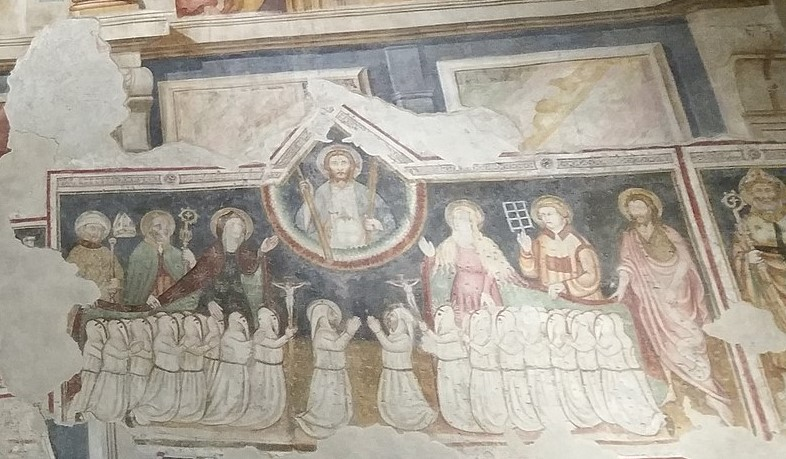 Affresco di Cristo benedicente con santi e disciplini-XIV secolo